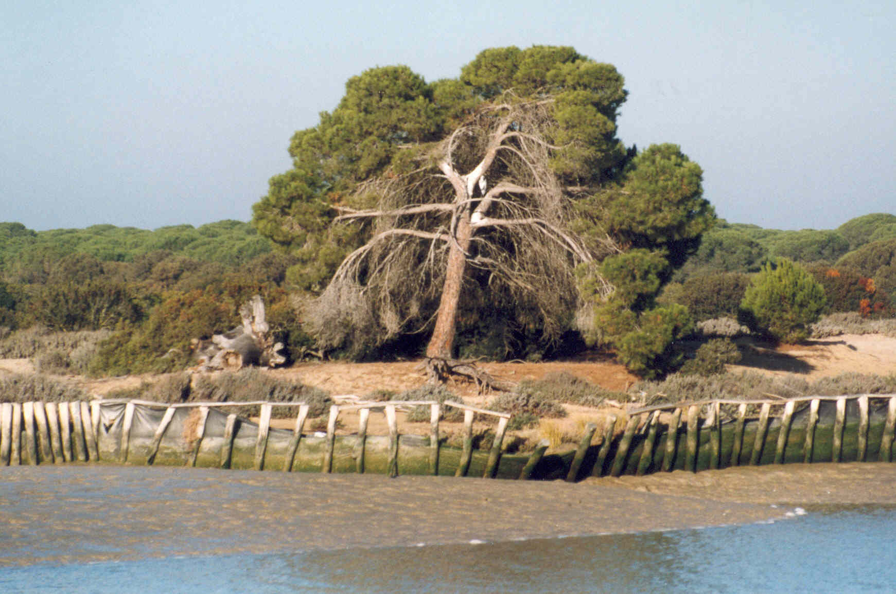 eigen foto